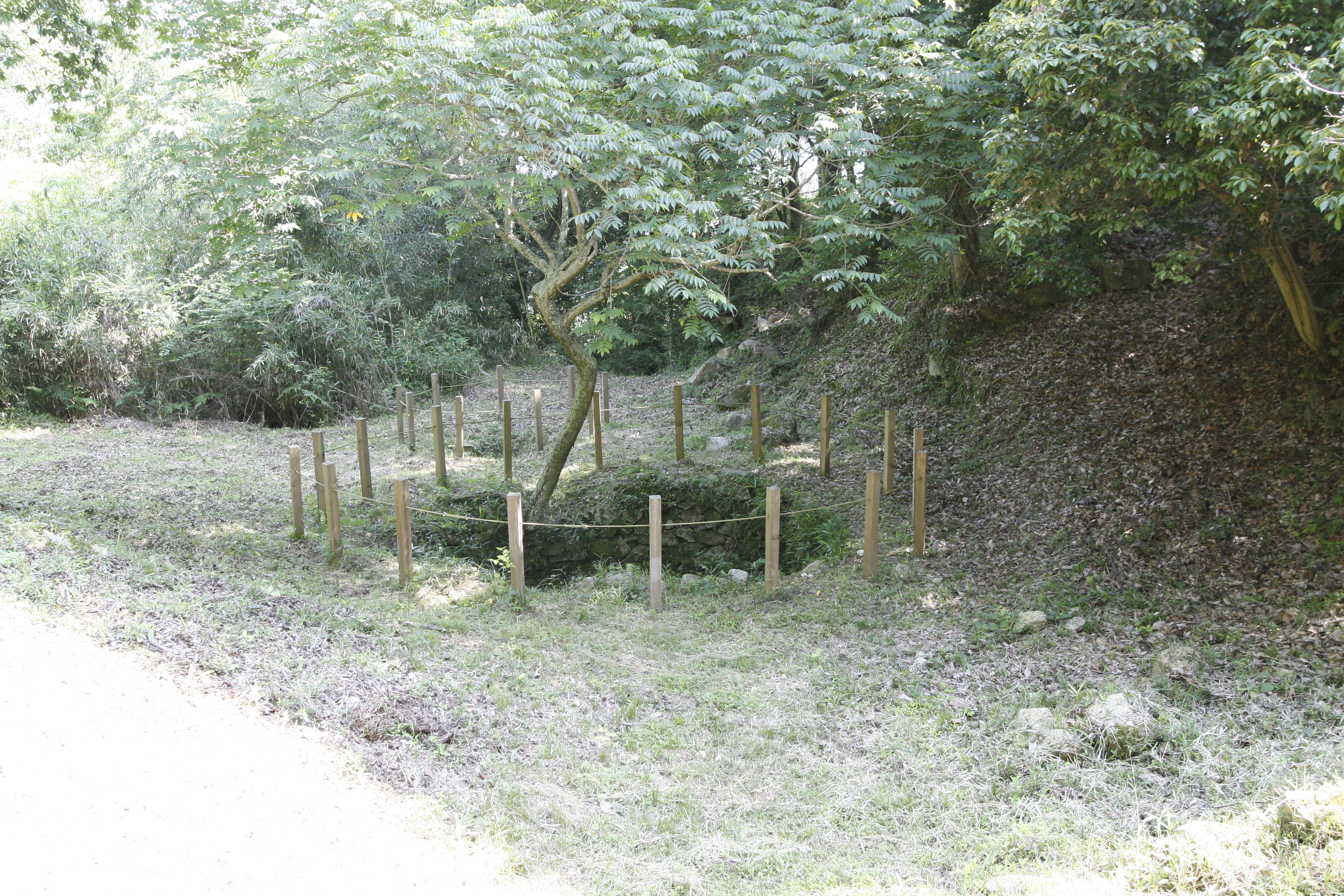 新高山城の井戸